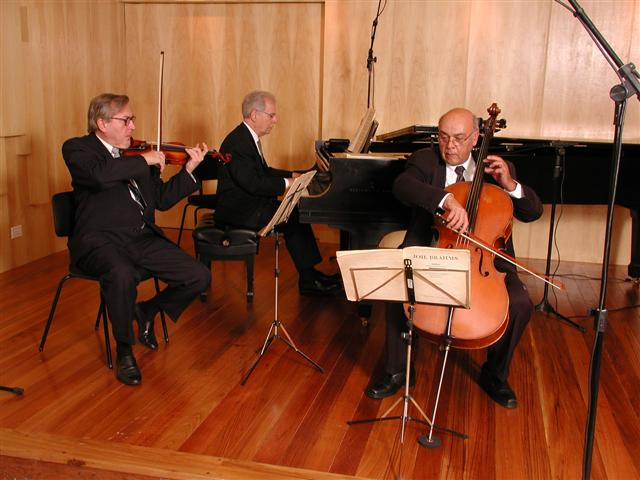 Auditório da Fundação Maria Luisa e Oscar Americano São Paulo Brasil